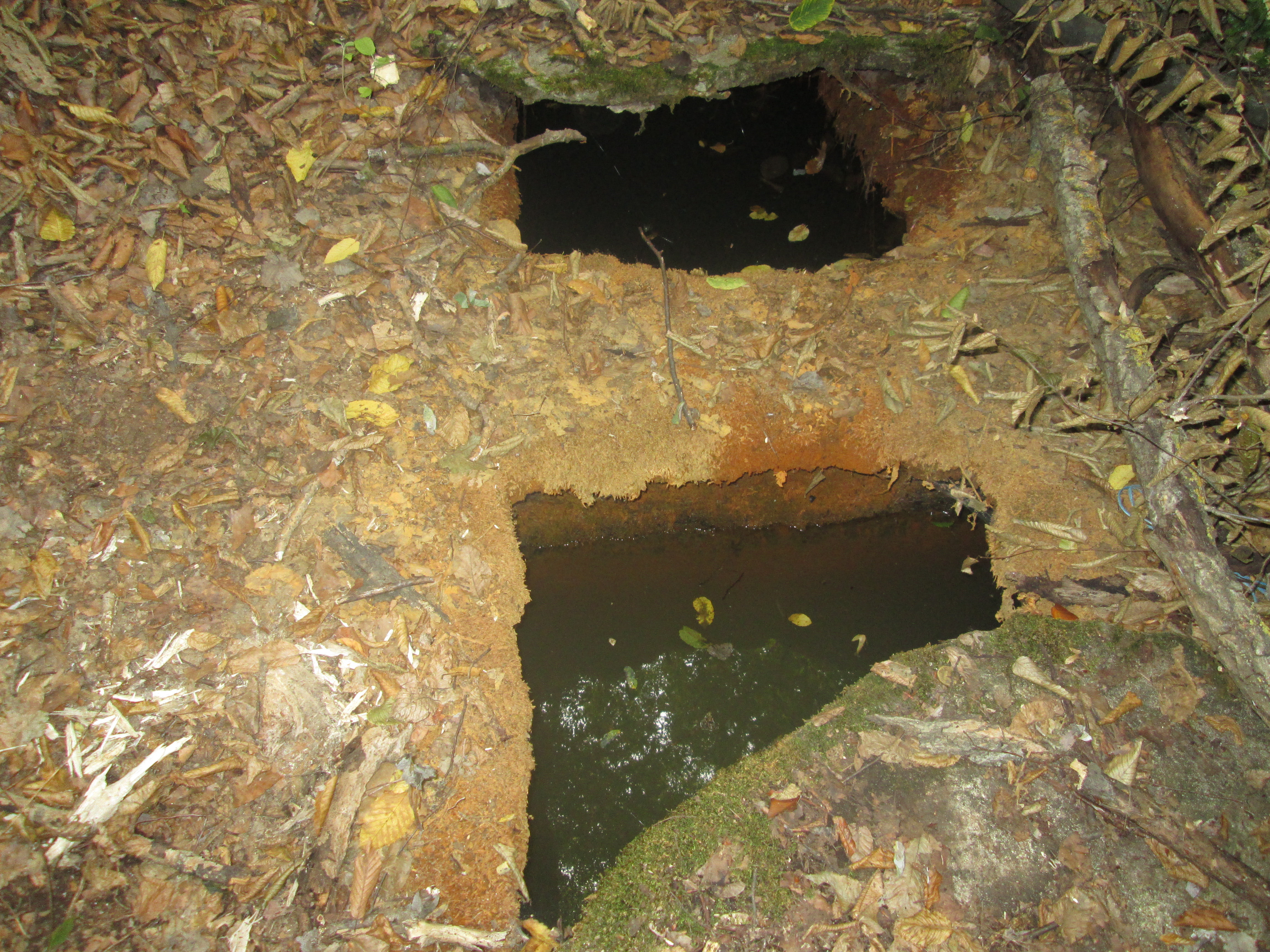 Српски (ћирилица): Извори Кисела вода у Мирашевачкој бањи